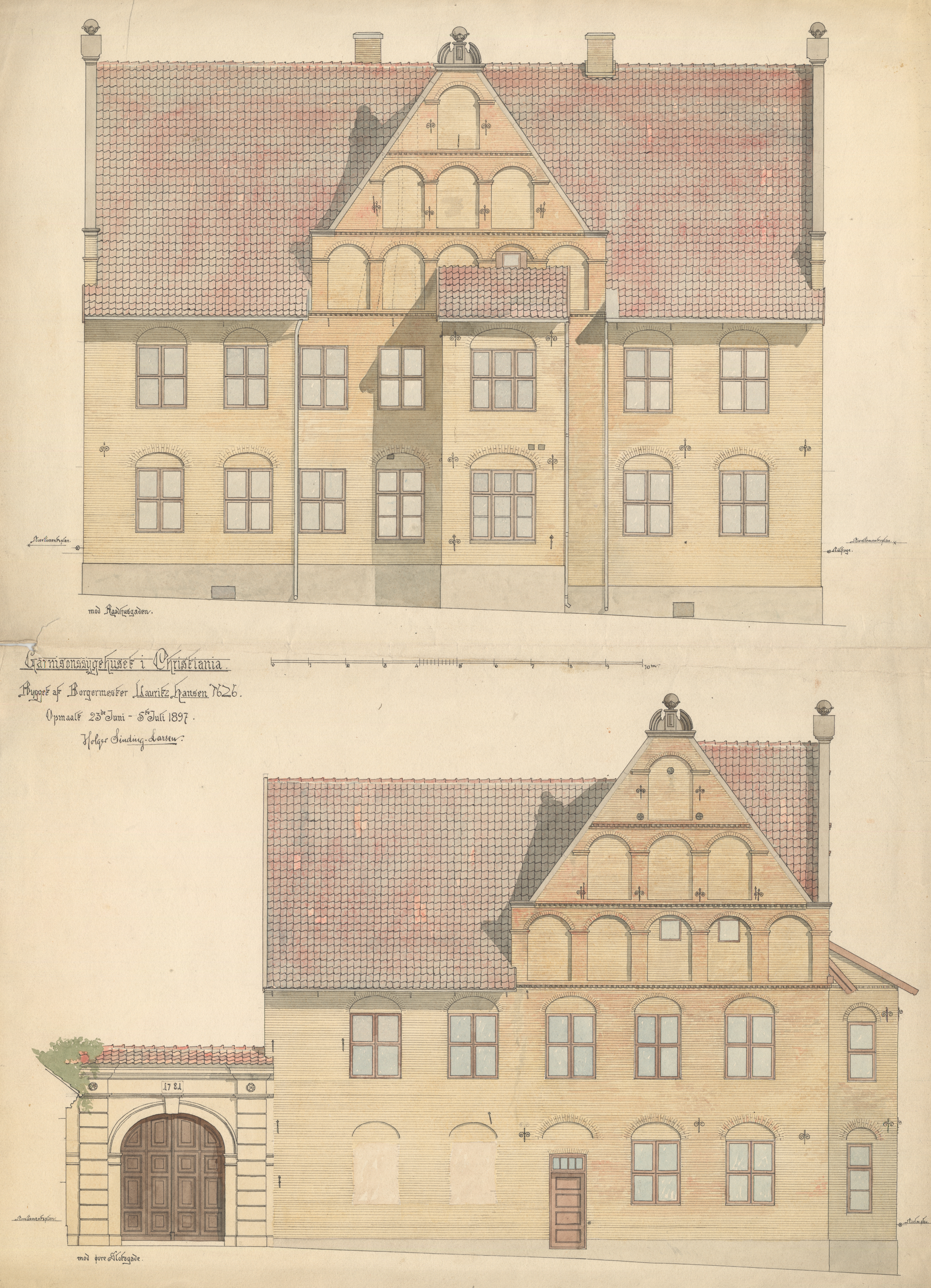 Bildet er hentet fra Riksantikvaren. Garnisonssykehuset. Mod Raadhusgaden og Øvre Slotsgade. Eksakt datering: 1626 Eier : Riksantikvaren Sted : Norway, Oslo, Oslo Emneord: BYGÅRDER, SYKEHUS, RÅDHUS , TEGNINGER (DOKUMENTASJON), ARKITEKTURTEGNINGER, FASADETEGNINGER Medium : Tusj